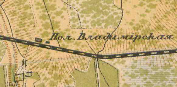 Полустанция Владимирская на карте 1885 года.